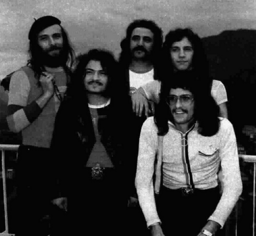 Delirium at "Un disco per l'estate 1972"